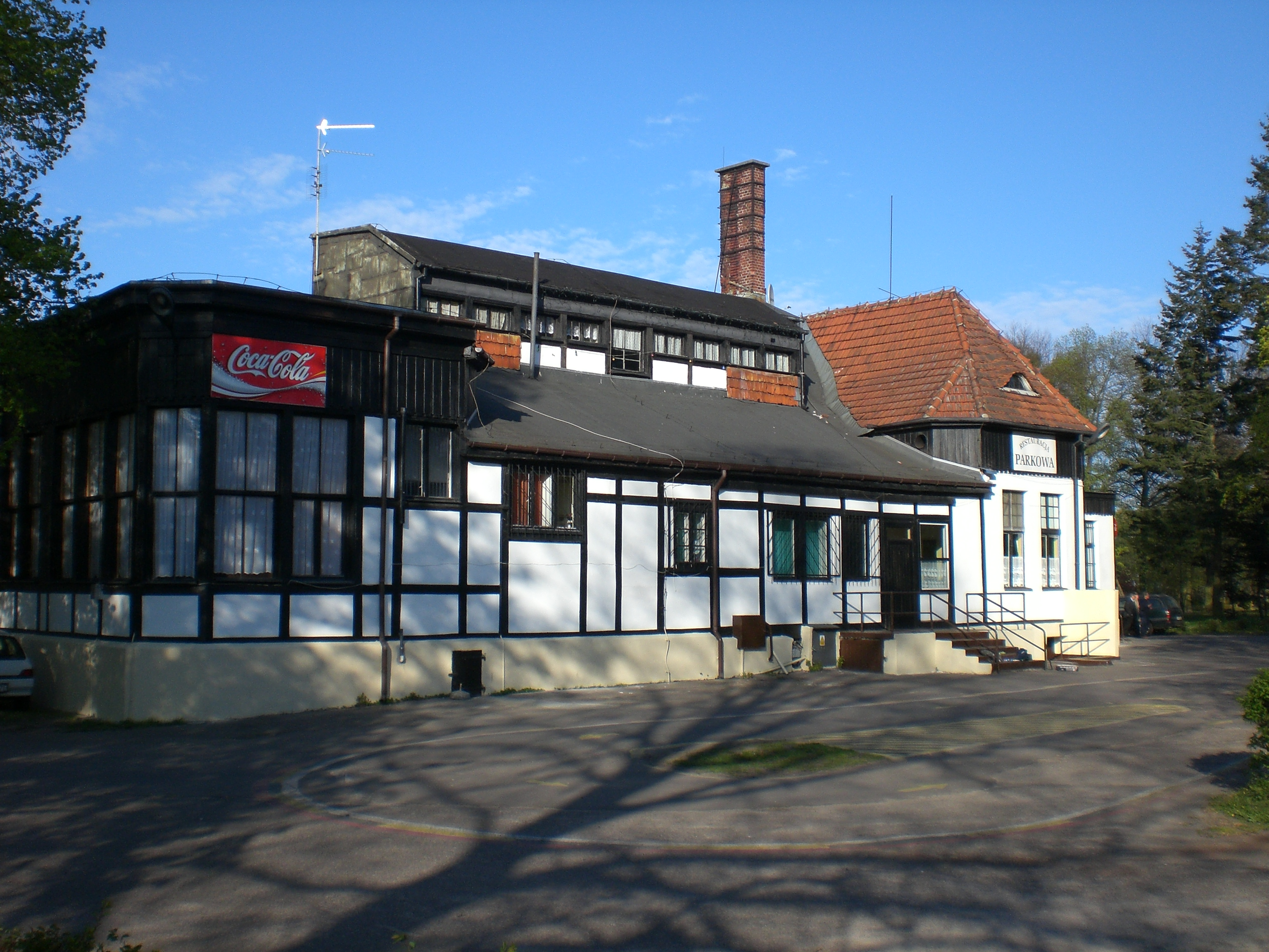 Gdańsk Jelitkowo - Restauracja "Parkowa" w Parku Jelitkowskim, ul. Pomorska 57a.